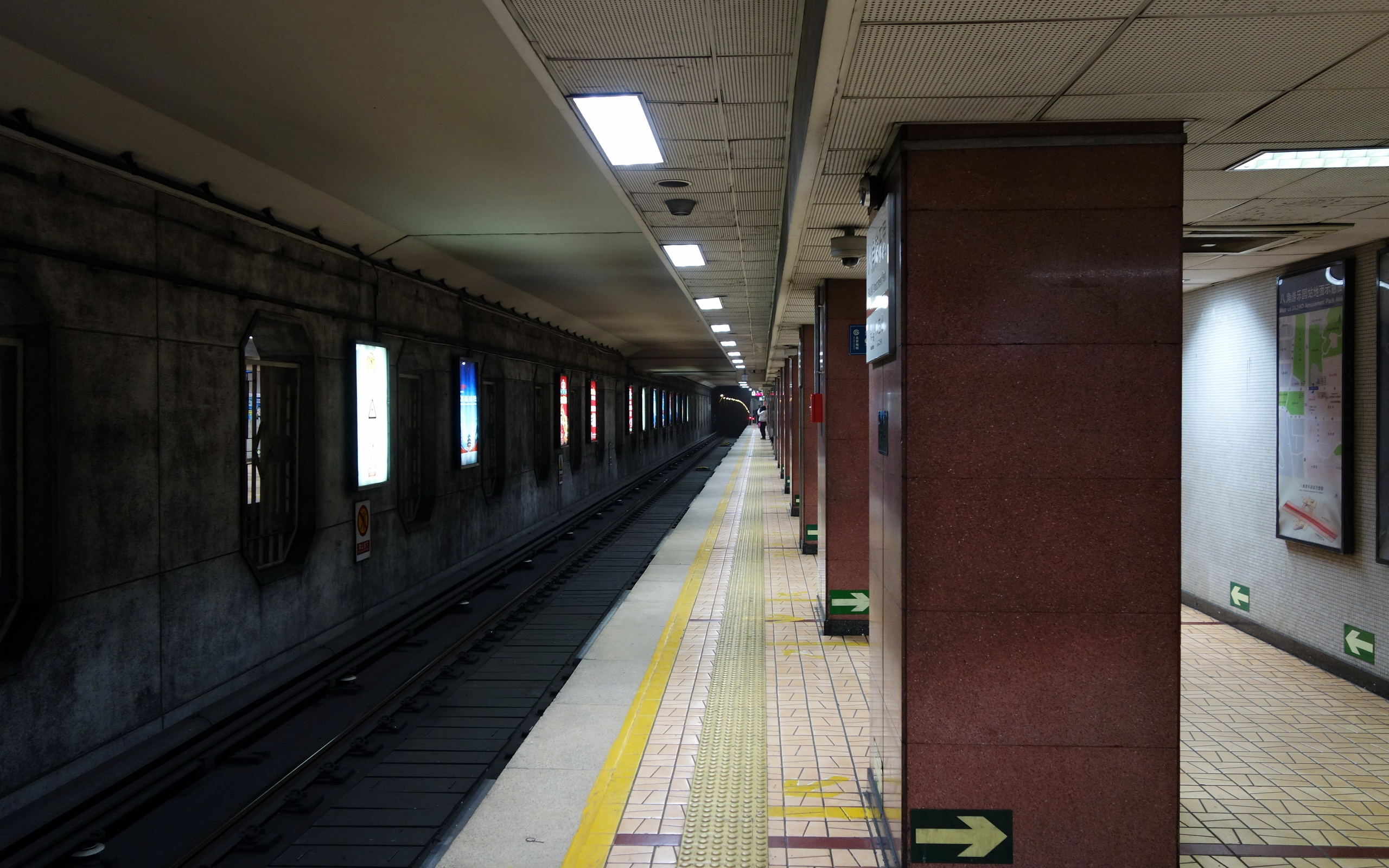 北京地铁1号线八角游乐园站侧式站台